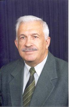 Стиров Владислав Володимирович — академік АН вищої школи України